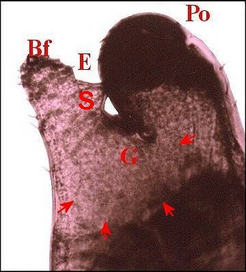 Prosoma d' Argyrodes éclairci avec la glande clypéale vue par transparence